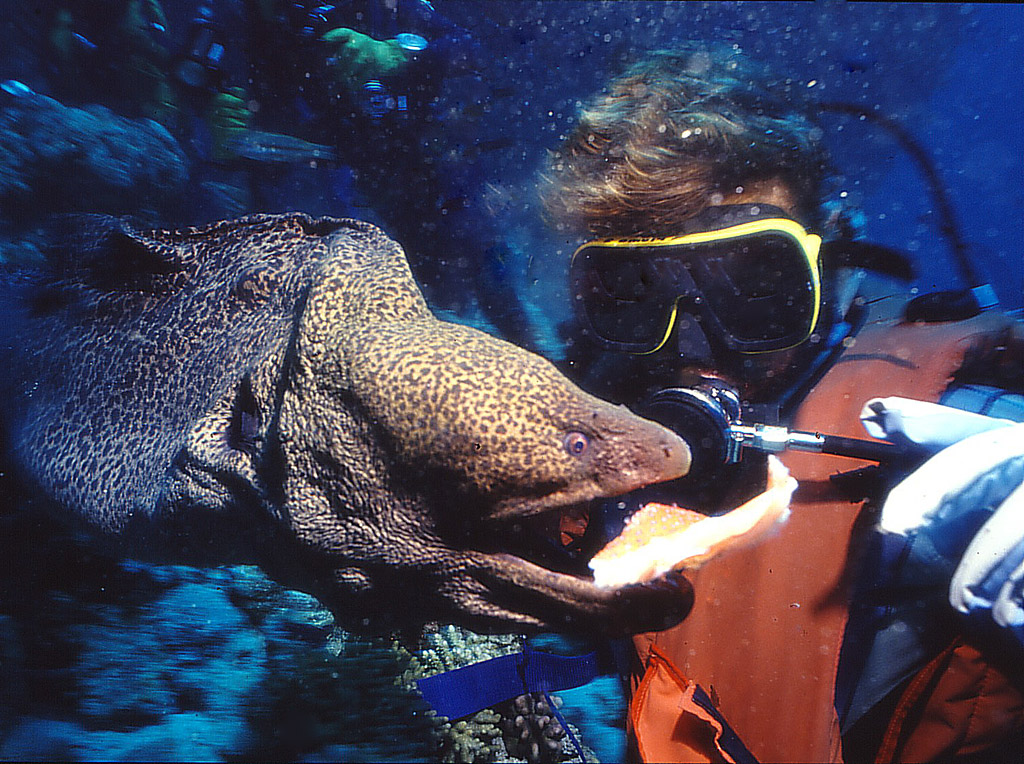 foto di Patrizio Napolitano Utente:Patrizio1948 da lui autorizzata